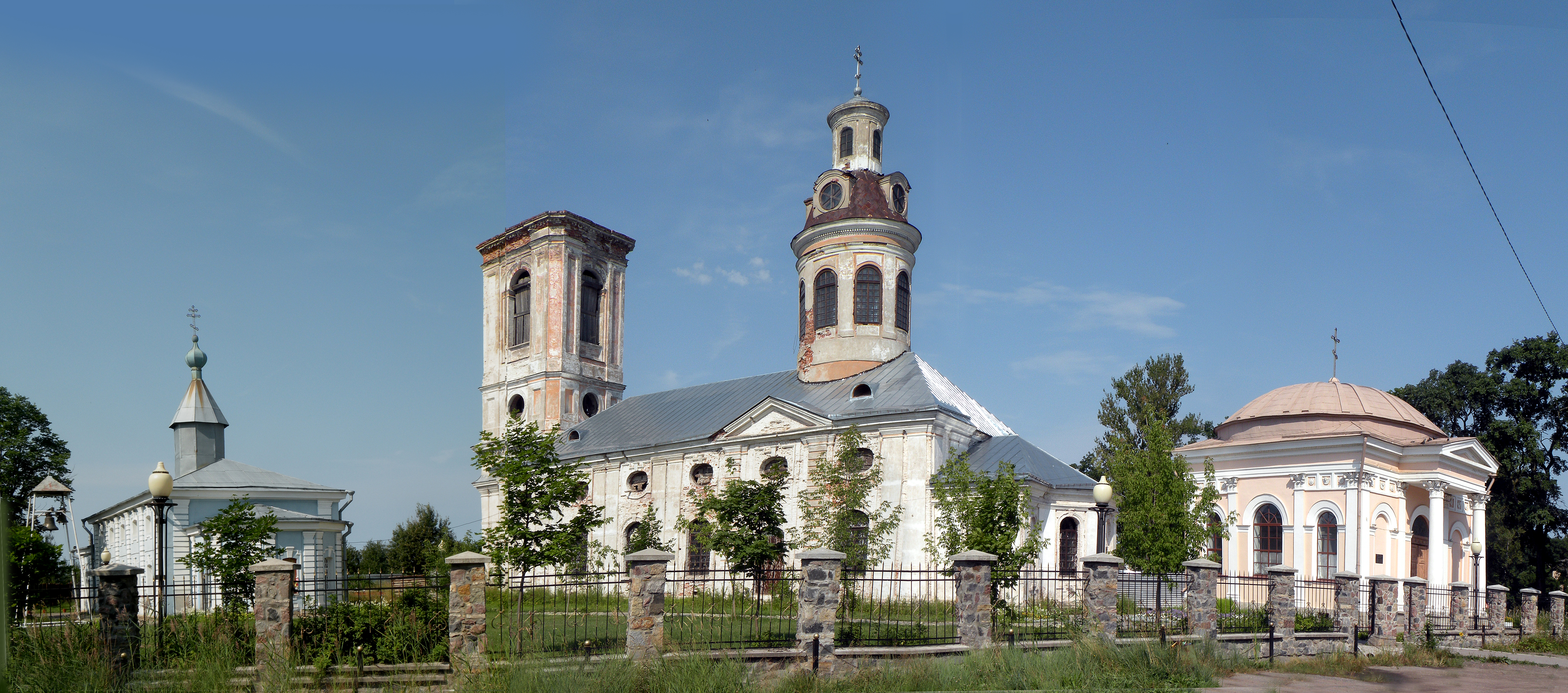 Шлиссельбург. Соборный комплекс. (cлева-направо): Никольская церковь, Благовещенский собор (1764—1795) и Казанская часовня (1864, арх. Г.Ершов